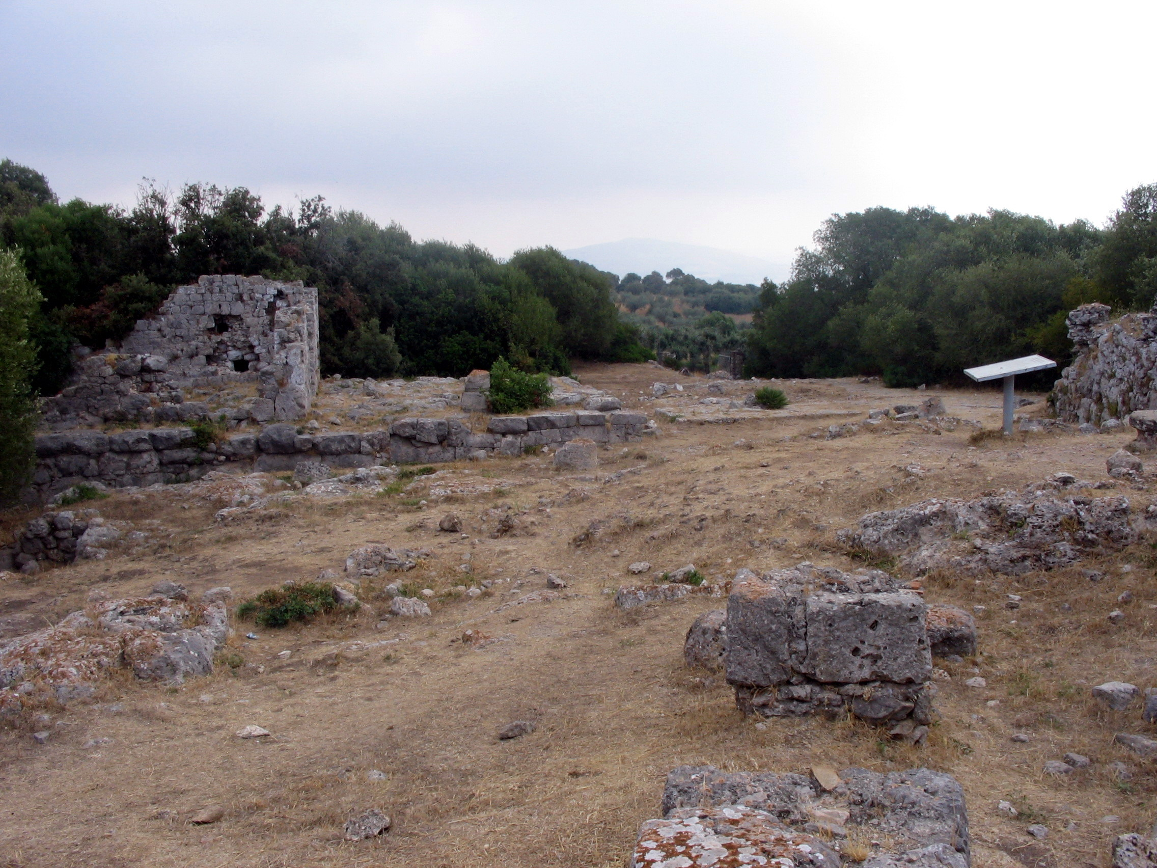 Tempio della Mater Matuta a Cosa, Ansedonia, Orbetello, Toscana, Italia